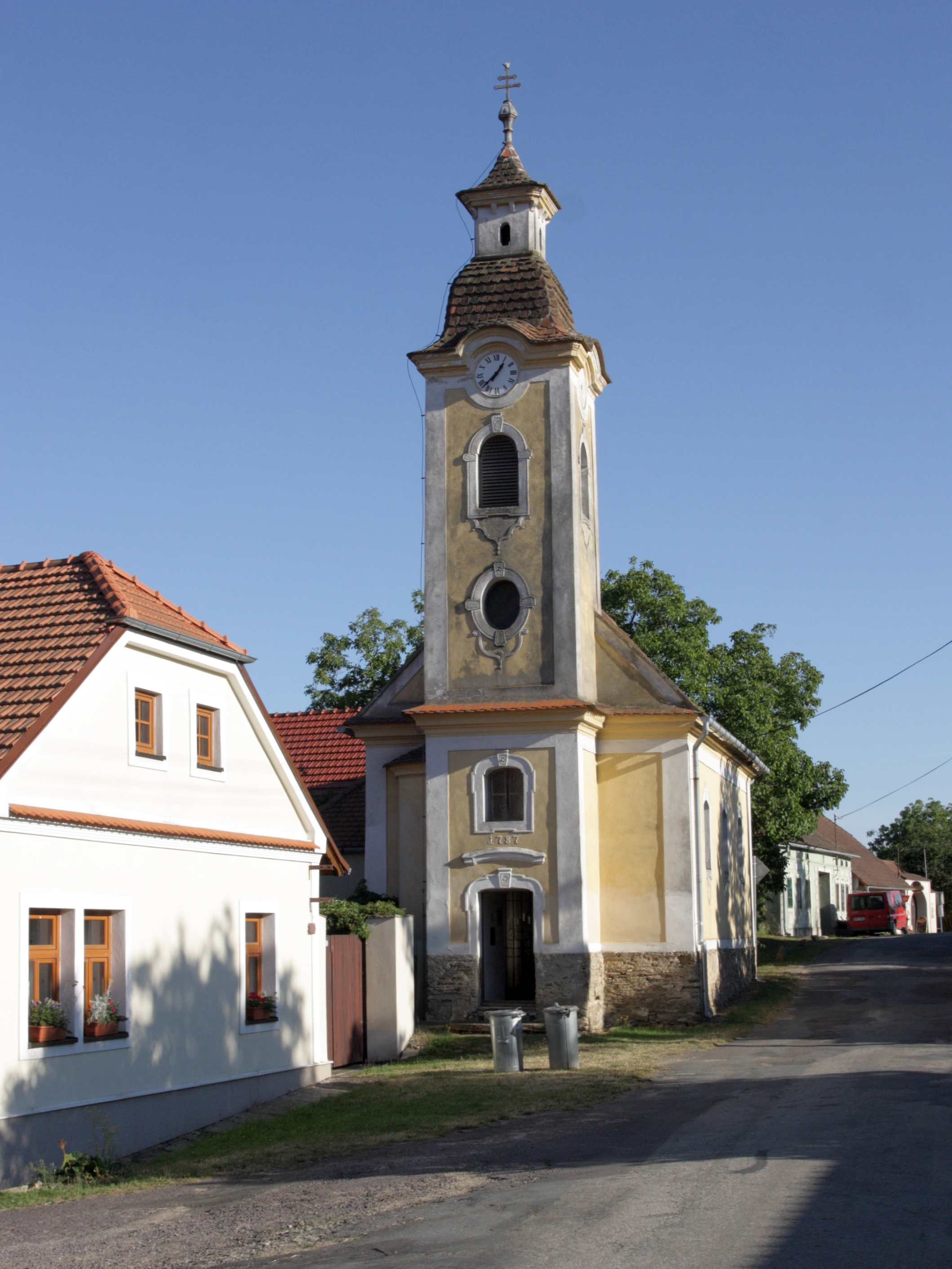 Čížov (Horní Břečkov) - kaple Panny Marie Bolestné.